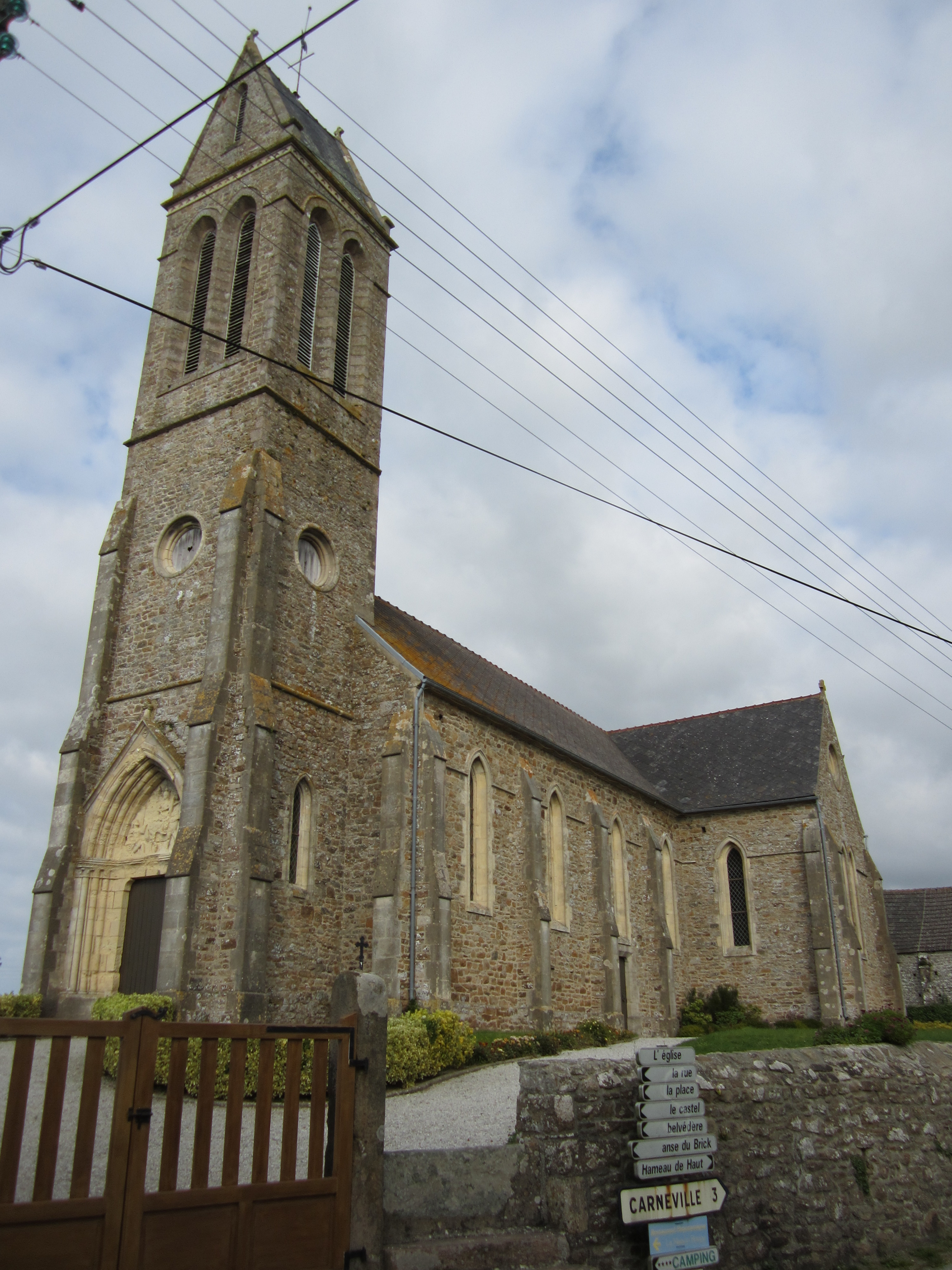 église Saint-Martin de Maupertus-sur-Mer